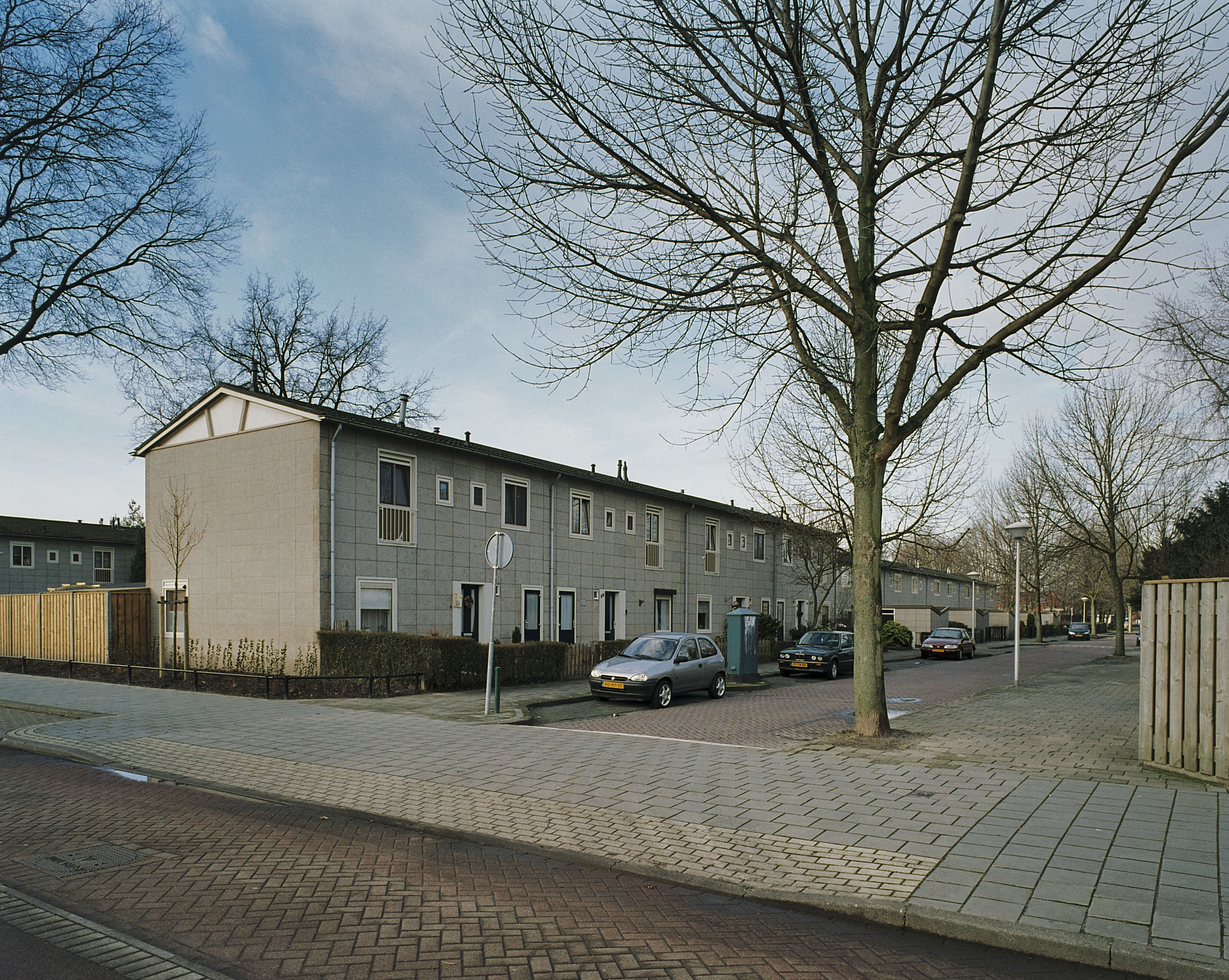 Woonwijk Lievendaal: Overzicht (opmerking: Wederopbouwproject)